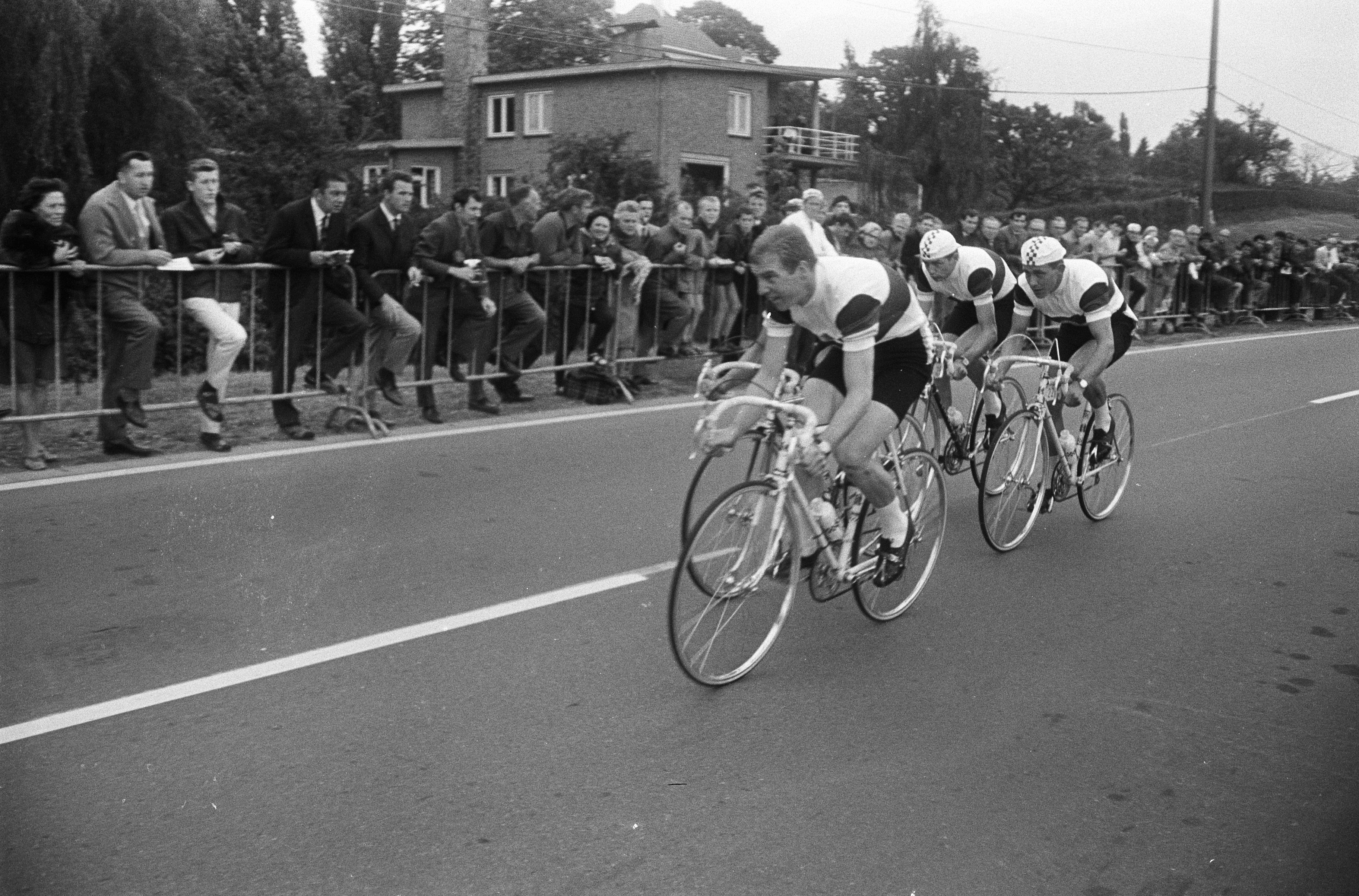 Collectie / Archief : Fotocollectie Anefo Reportage / Serie : [ onbekend ] Beschrijving : WK Wielrennen op de weg te Heerlen. De Nederlandse ploeg in aktie. De ploegen in aktie Datum : 31 augustus 1967 Locatie : Heerlen Trefwoorden : WIELRENNEN, ploegen Fotograaf : Merk, Ben / Anefo Auteursrechthebbende : Nationaal Archief Materiaalsoort : Negatief (zwart/wit) Nummer archiefinventaris : bekijk toegang 2.24.01.05 Bestanddeelnummer : 920-6555